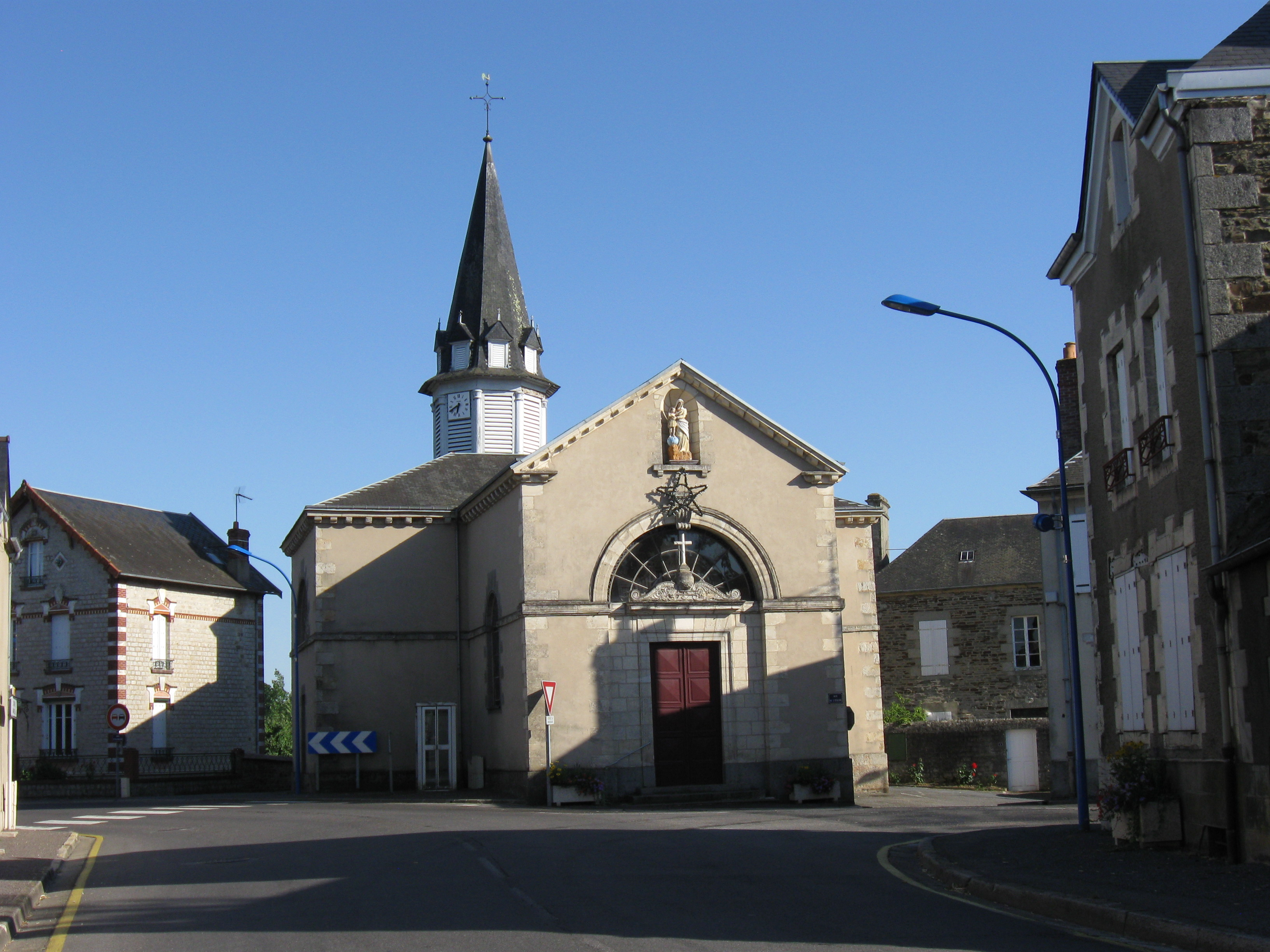 Église Notre-Dame d'Haleine. (département de l'Orne, région Basse-Normandie).